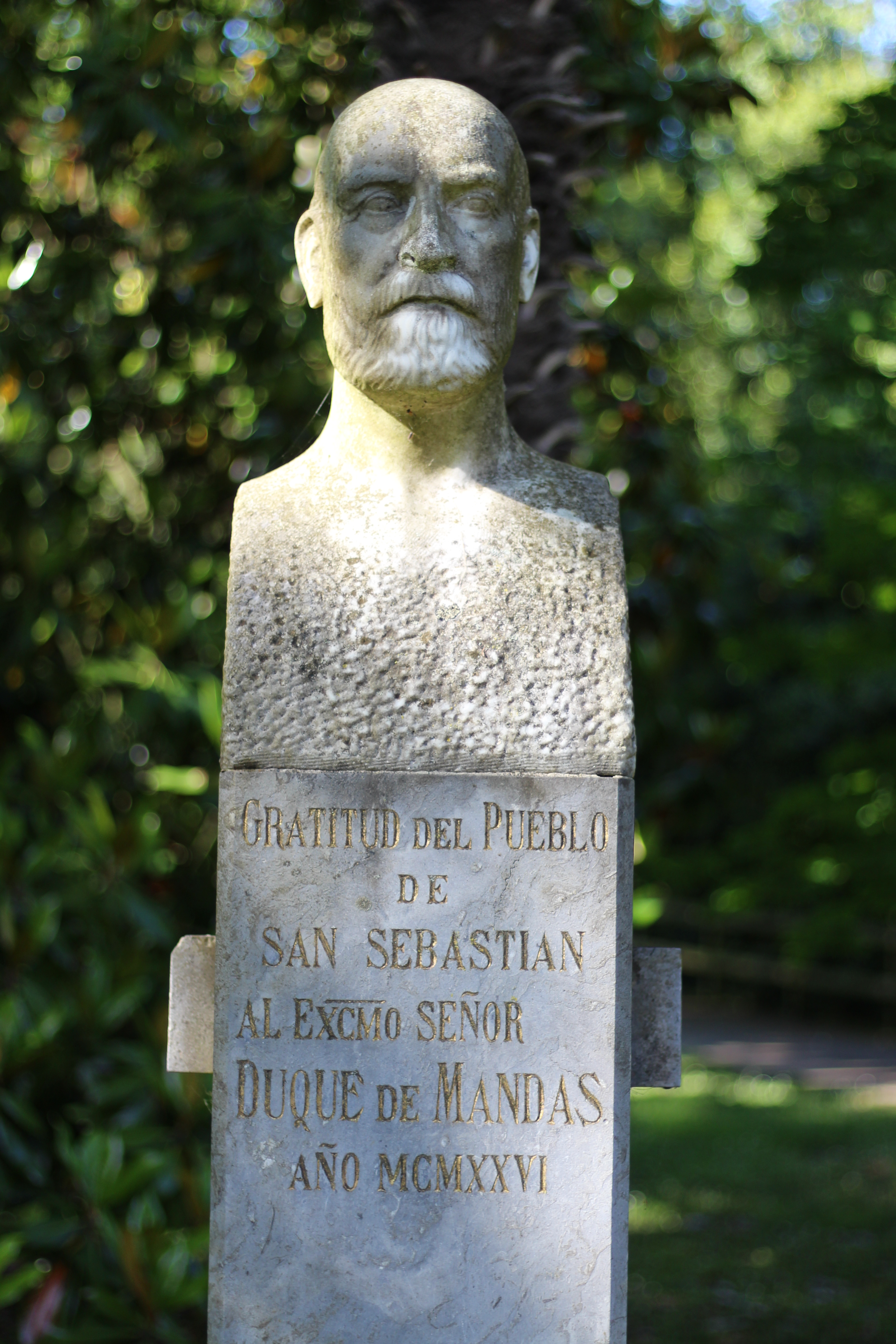 Fermin Lasala Collado, Mandasko Dukearen omenezko eskultura Cristina-enea oarkean